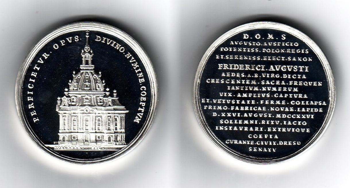 Medaille 1726, Frauenkirche Dresden (Replik)